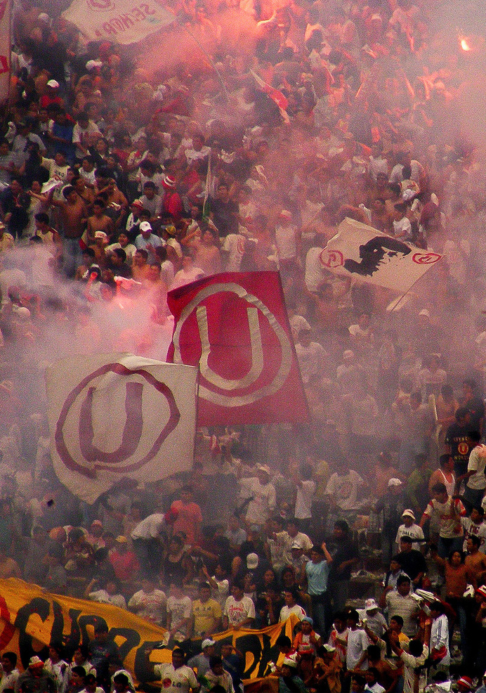 La Trinchera Norte durante la Final 2009